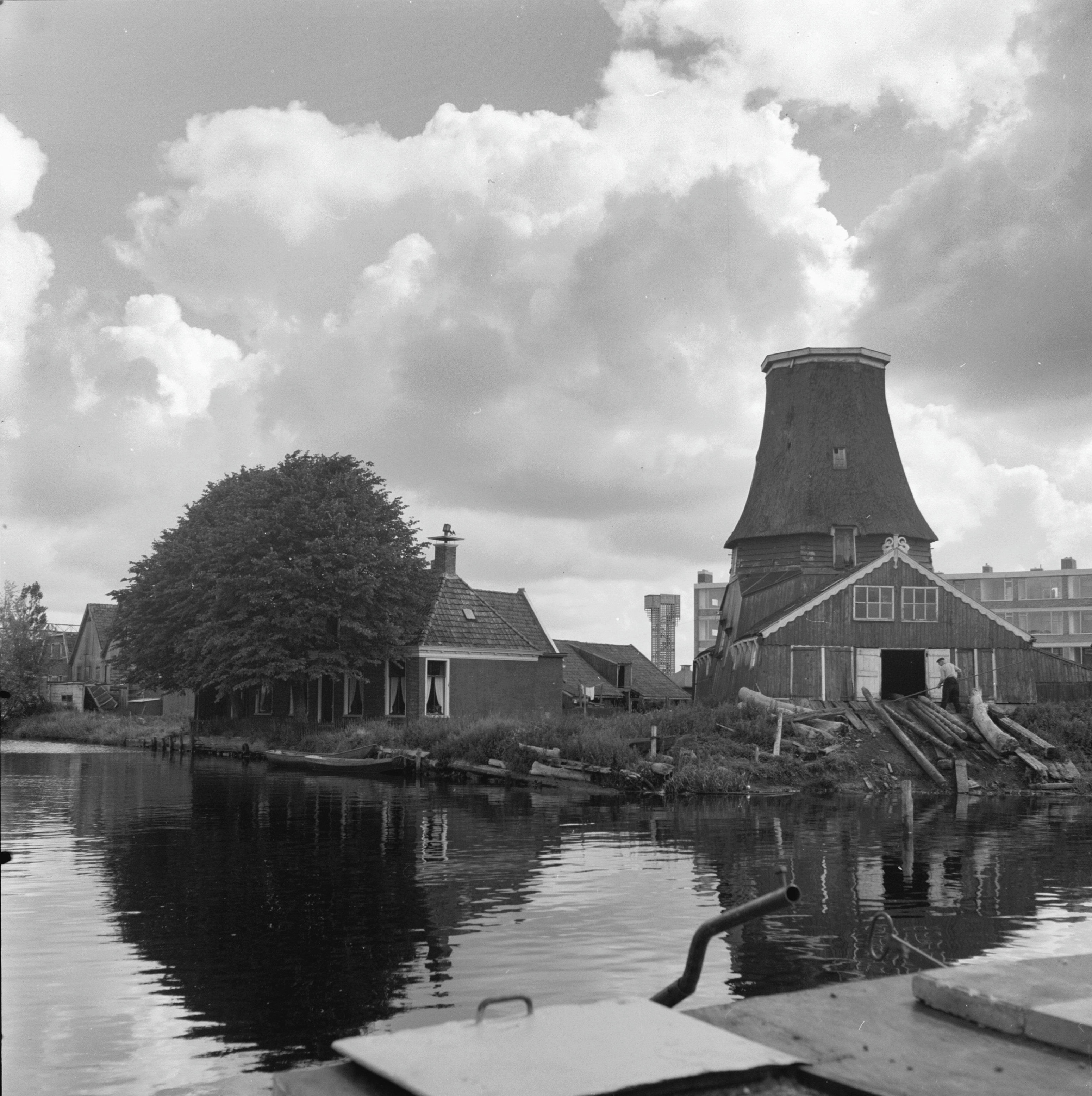 Diversen: Zoutmolen aan Houtpolle